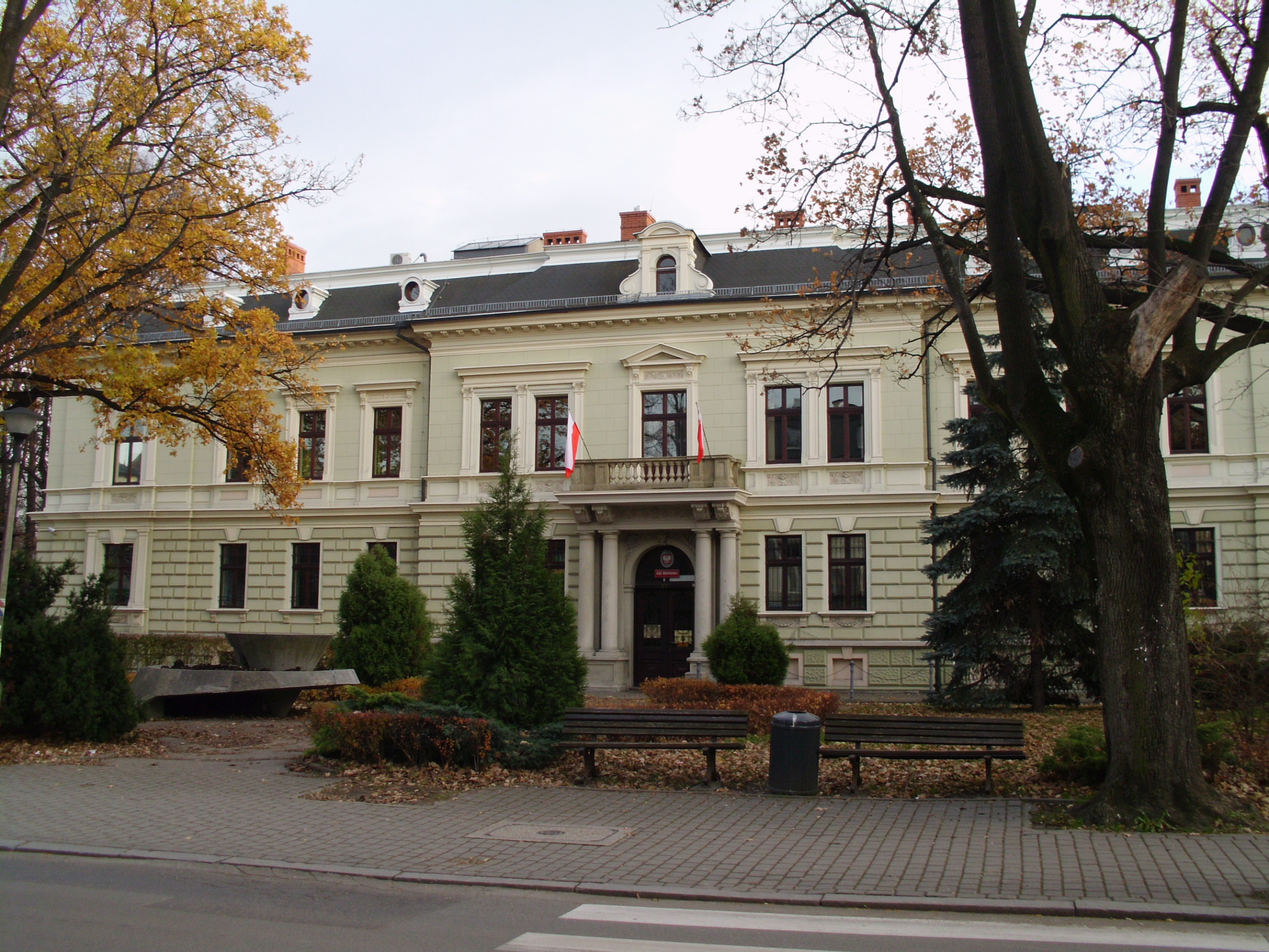 Budynek Sądu Rejonowego w Żywcu Żywiec, ul. Kościuszki 39 05.1987.